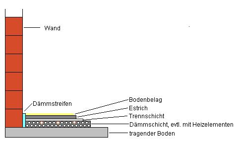 Grafische Darstellung eines Fußbodens